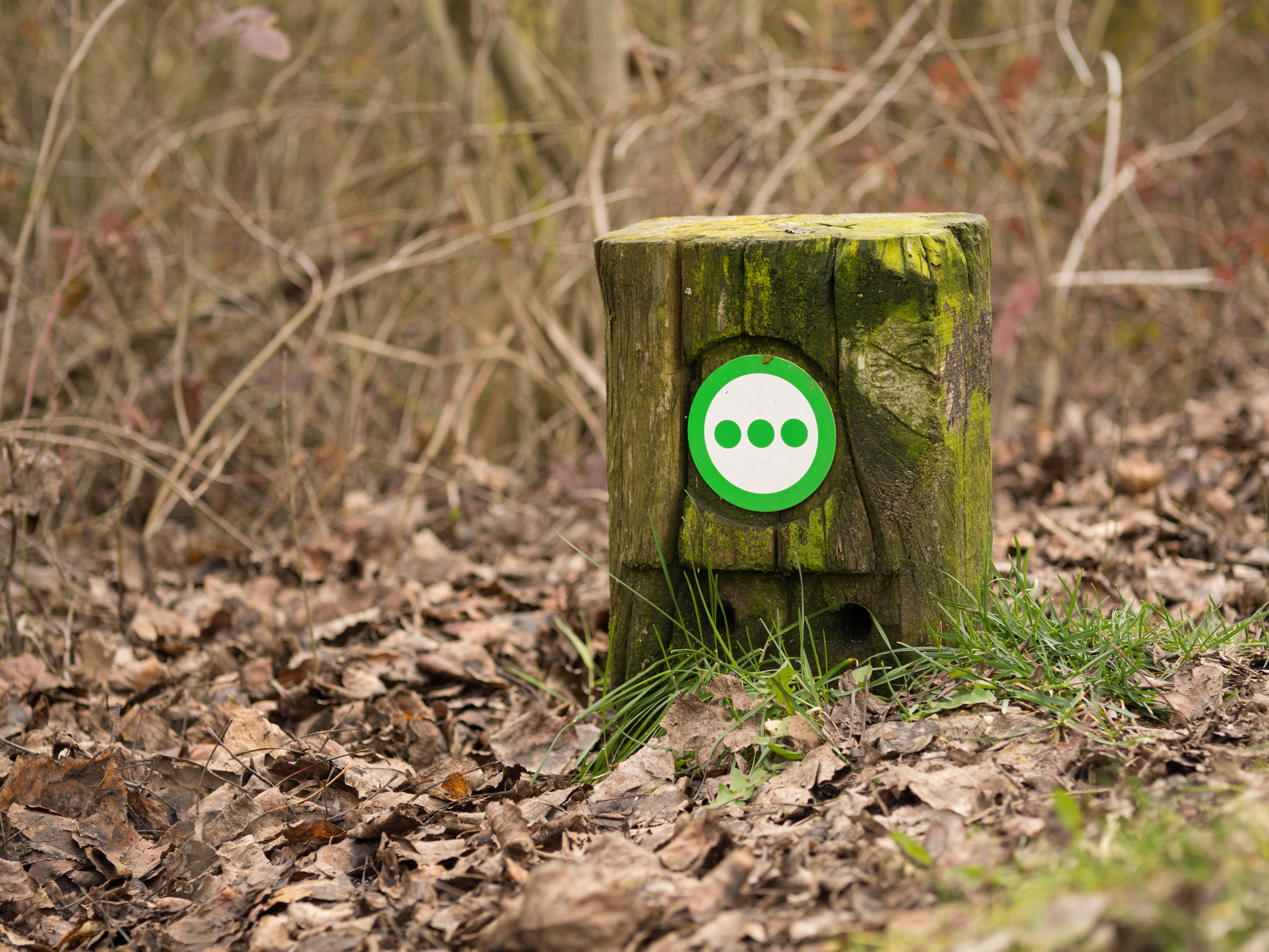 Marca del camino del anillo verde, Vitoria-Gasteiz, Álava, País Vasco, España